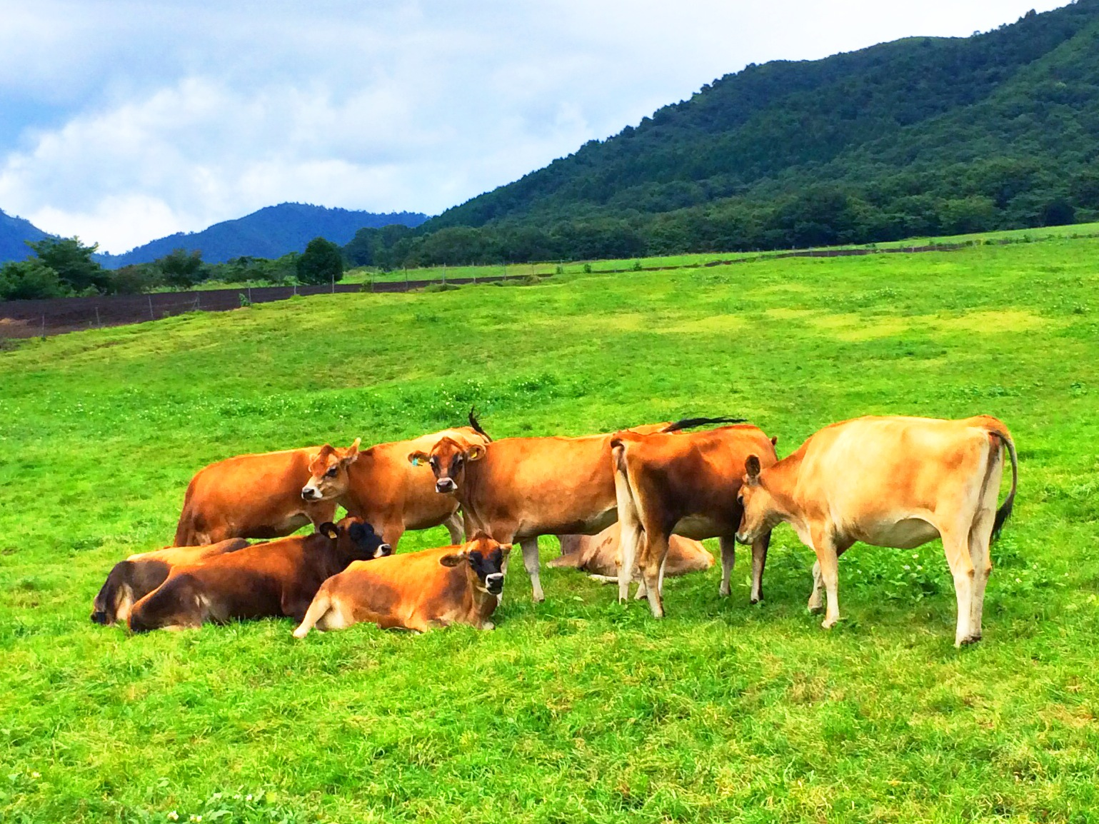 ジャージー牛。岡山県蒜山。蒜山ジャージーランドにて。